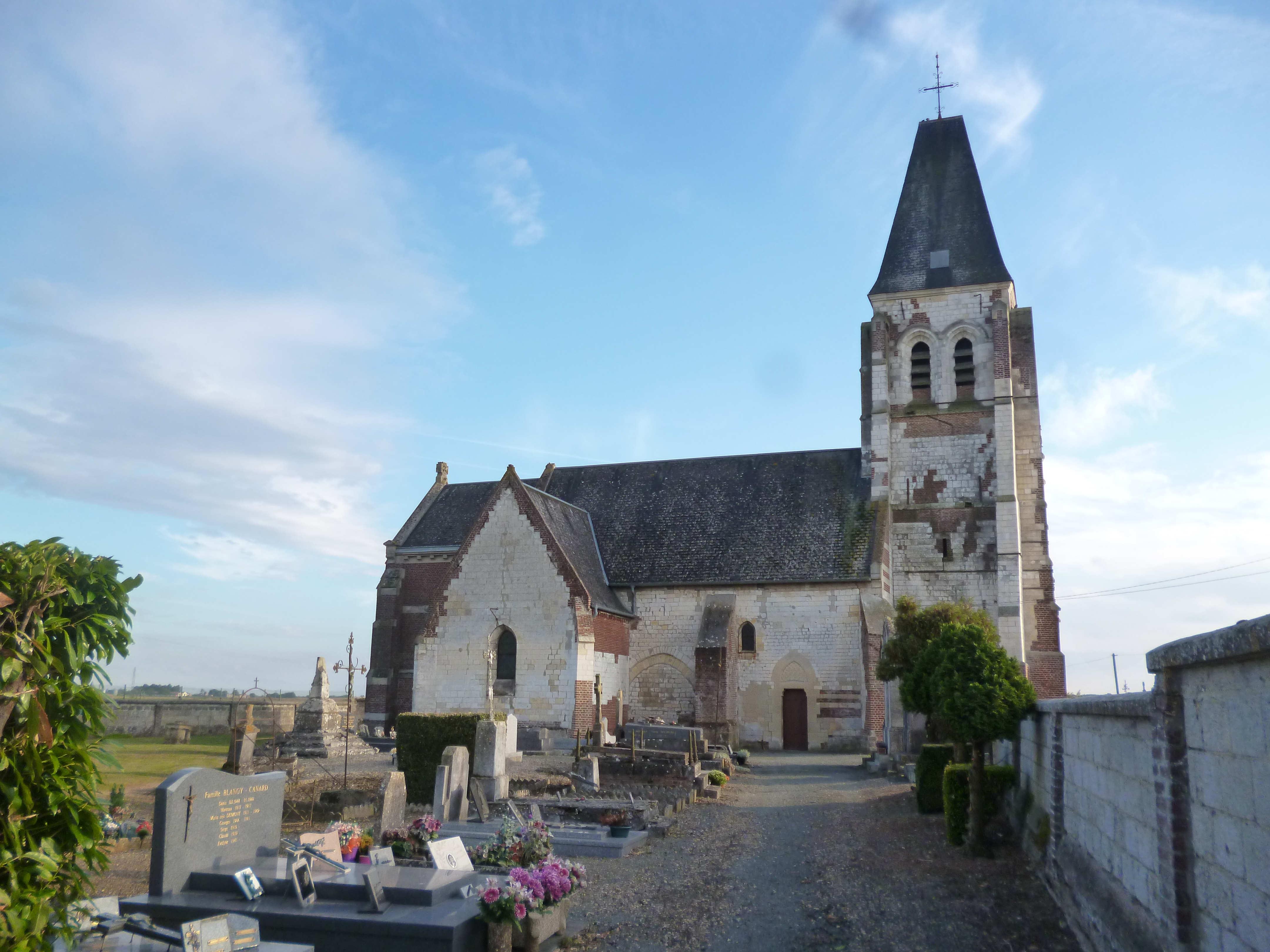 L'église Saint-Martin de Sérévillers (Oise).